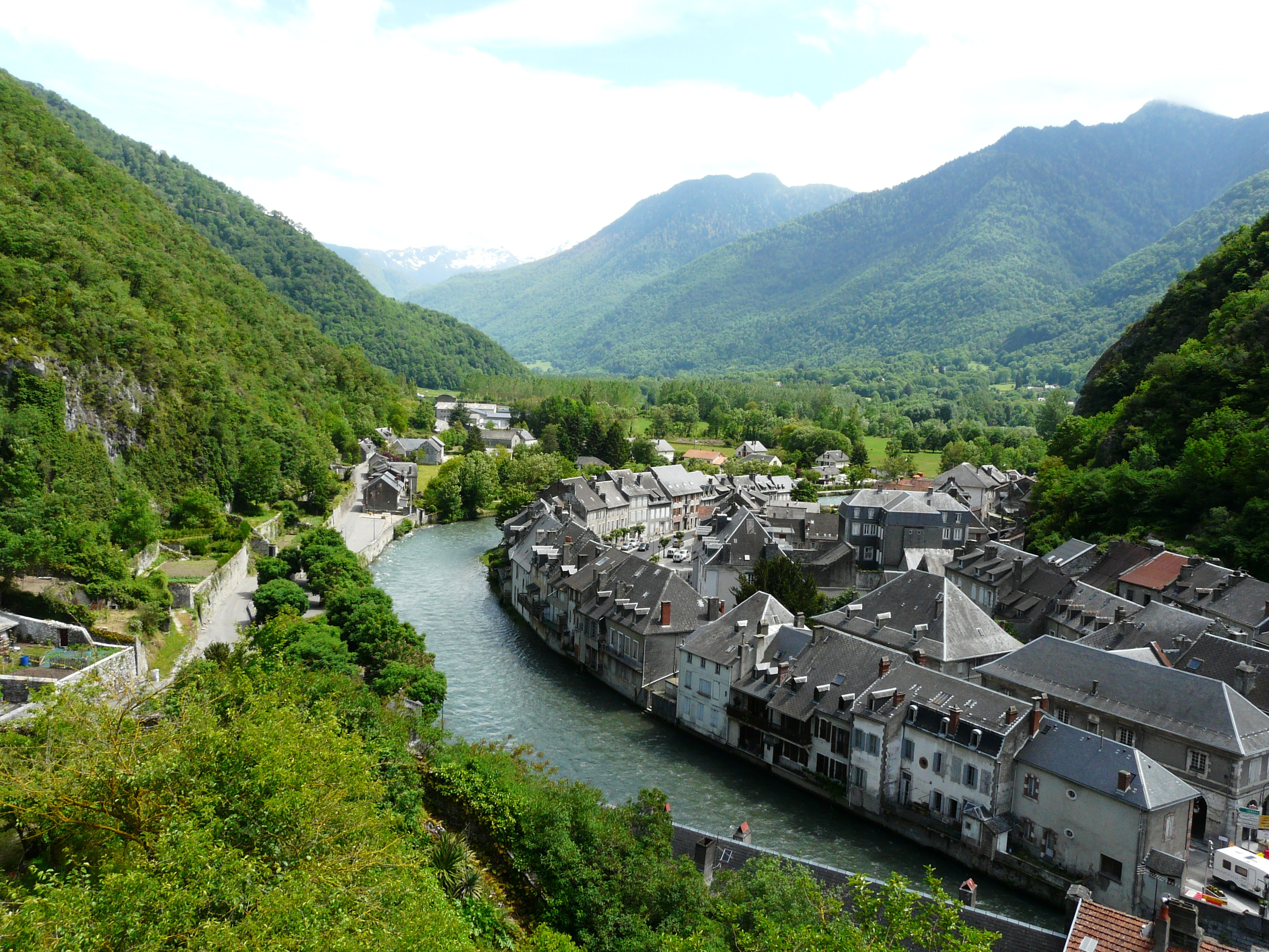 Traversé par la Garonne, le village de Saint-Béat, Haute-Garonne, France. Vue vers l'amont.